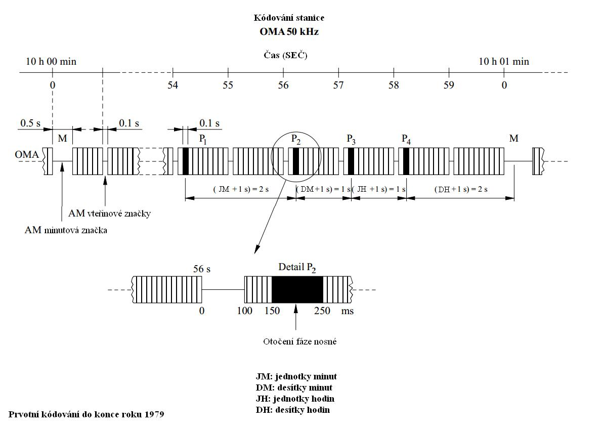 OMA50